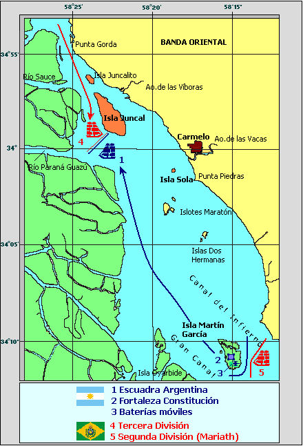 Batalla de Juncal, situación previa